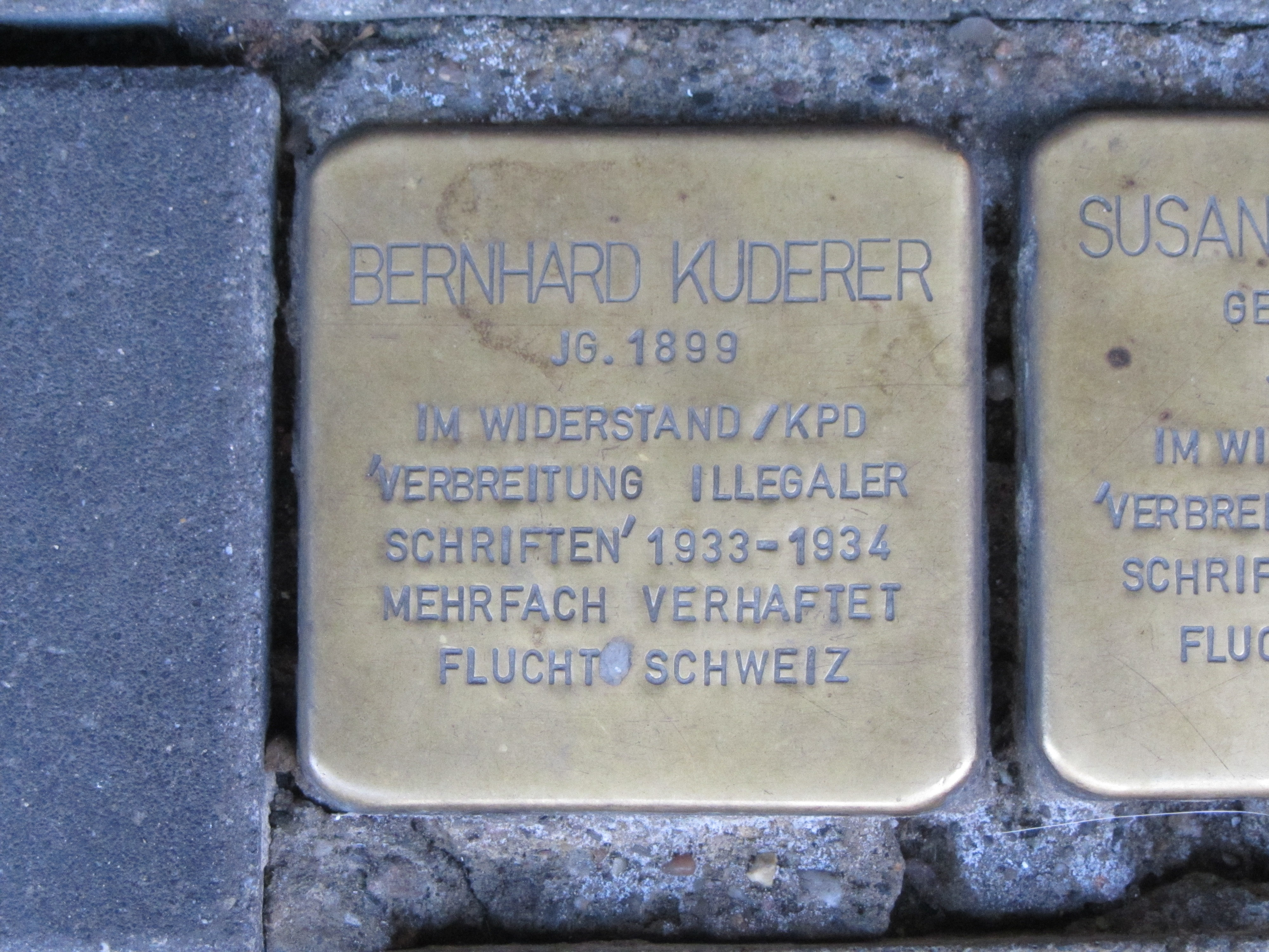 der Stolperstein für Bernhard Kuderer vor dem Haus Ekkehardstraße 15 in Singen